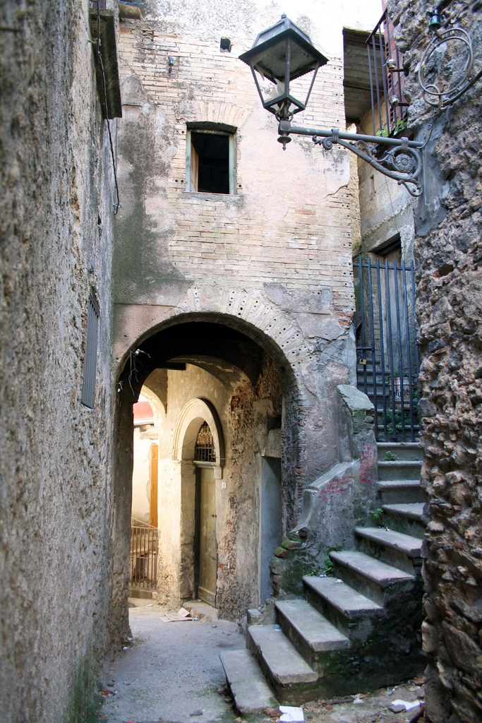 cavune